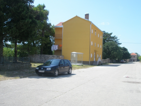 Центар Ервеника(Бутига)